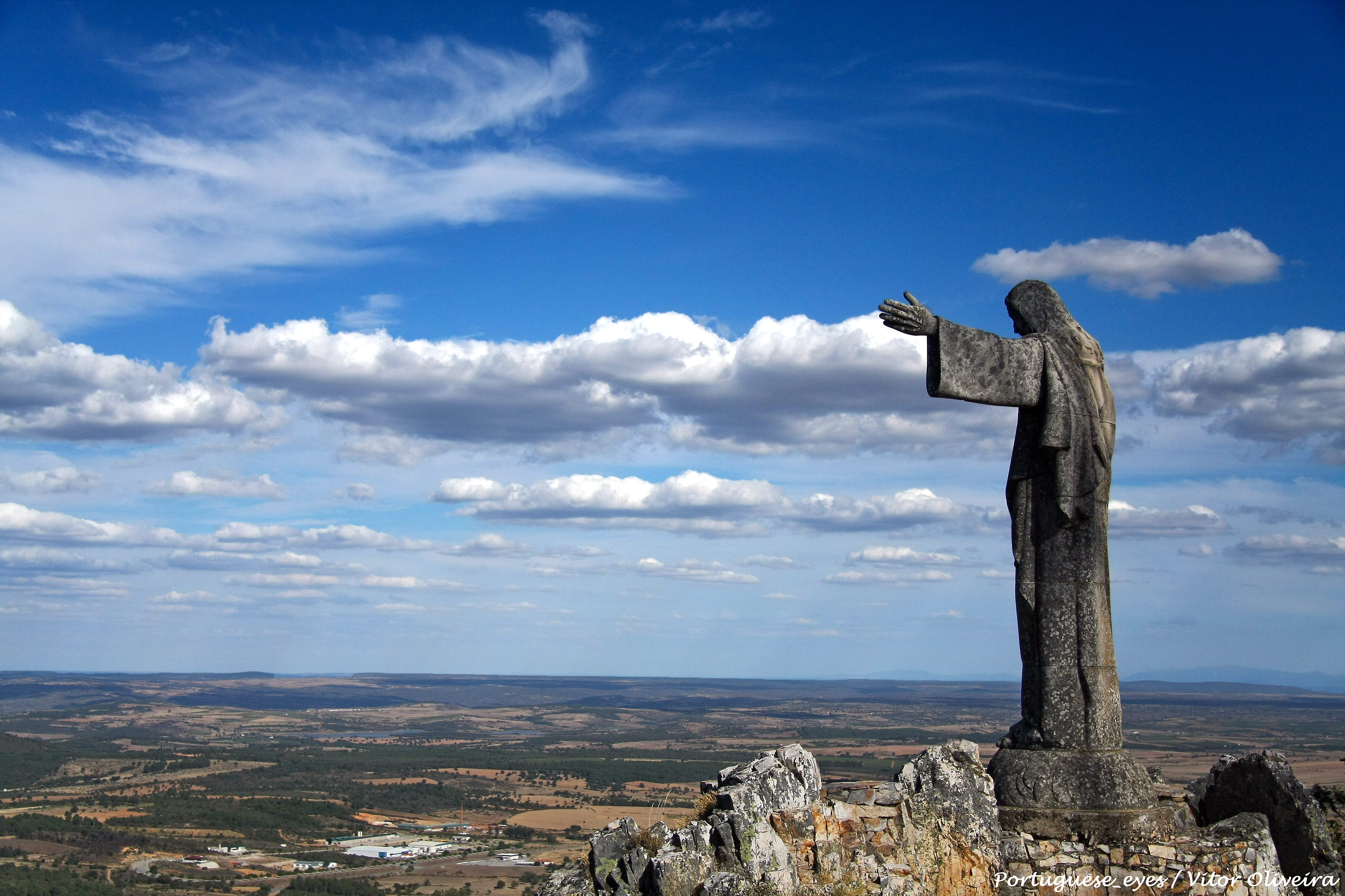 Serra da Marofa - Portugal